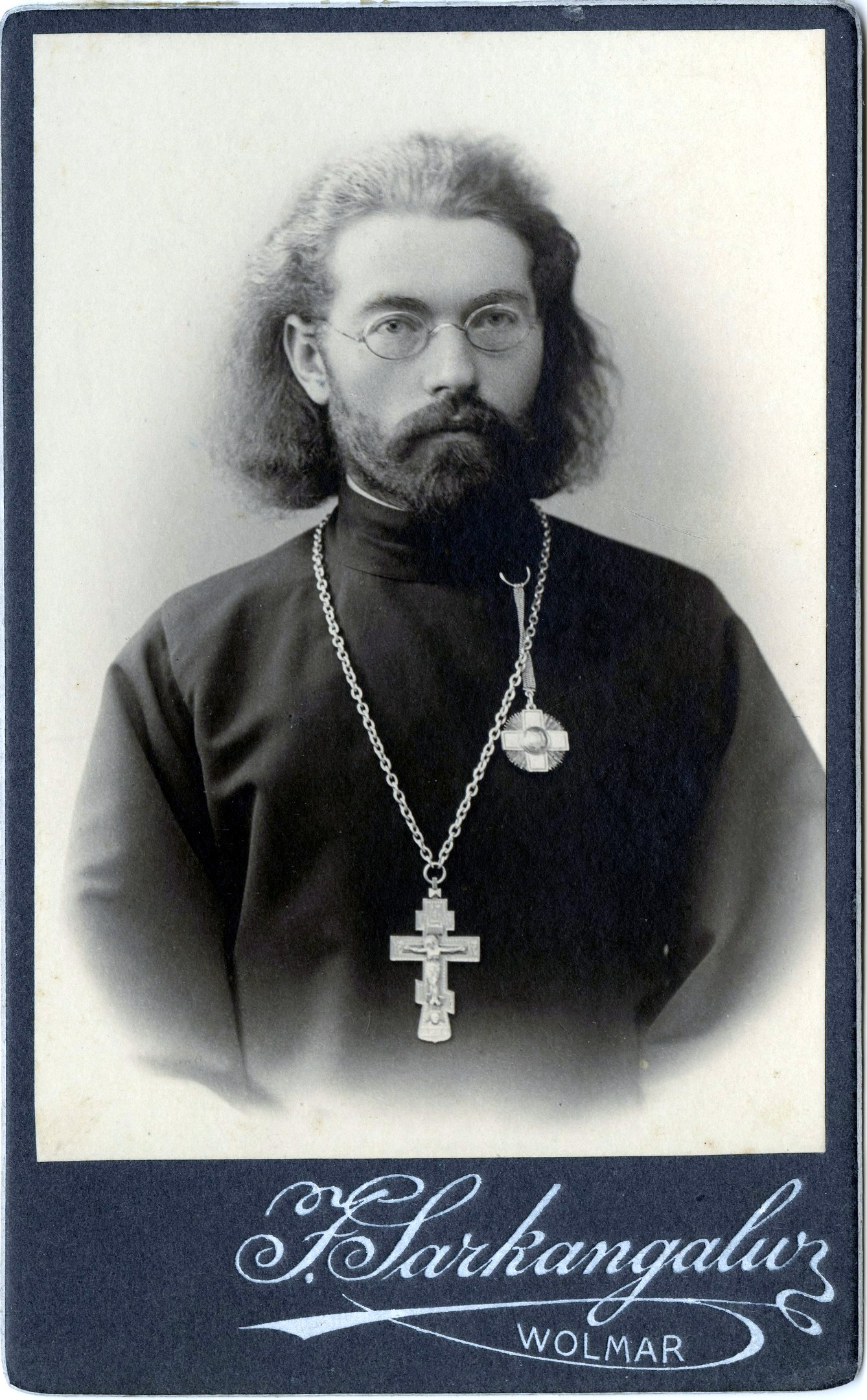 Протопресвитер Иоанн Андреевич Янсон (1878-1954)